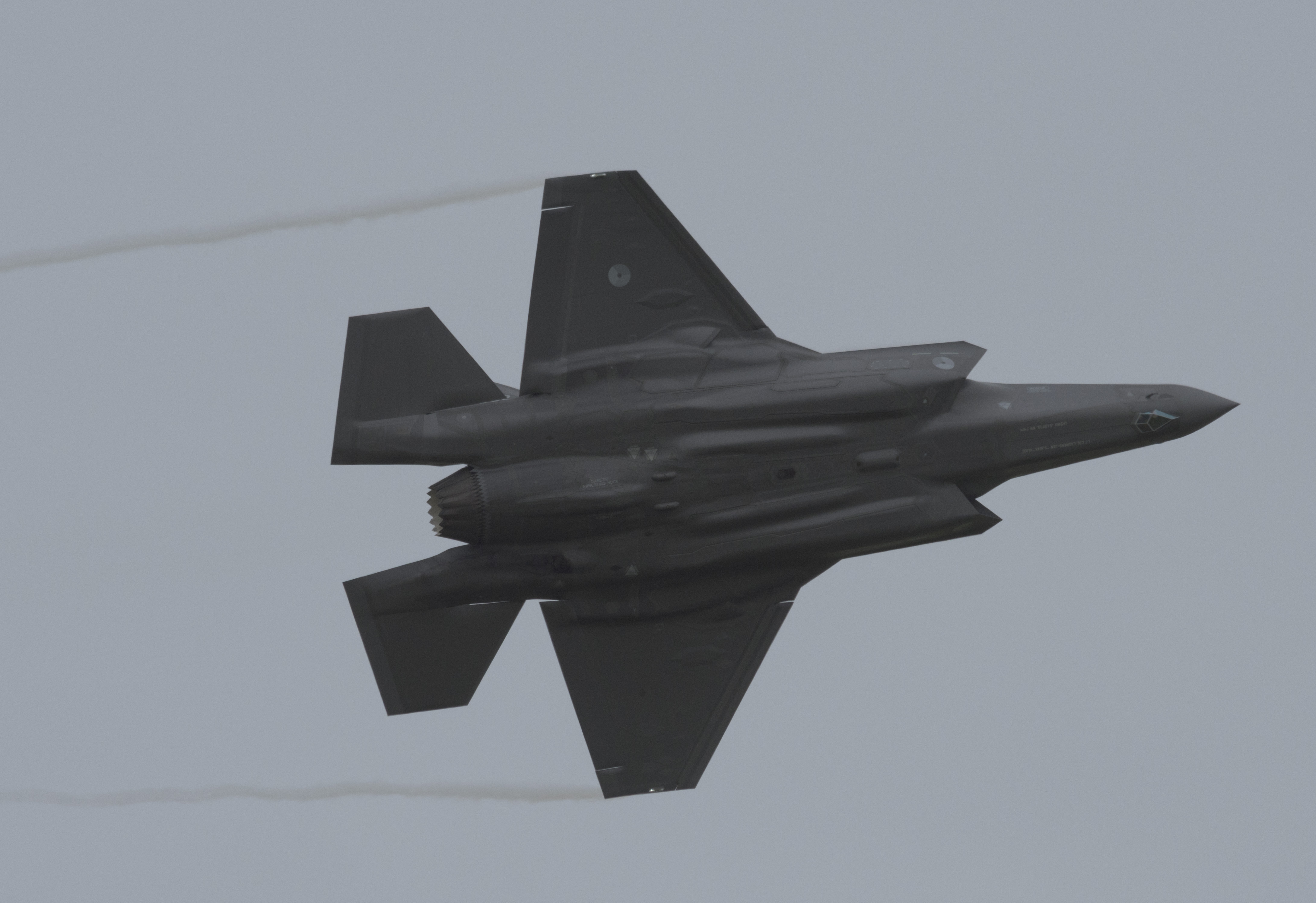 Een F-35 vliegt voorbij tijdens een vliegshow, de foto is voldoende scherp om aanwijzingen aan de onderkant zoals 'DANGER ARRESTING HOOK' te kunnen lezen.